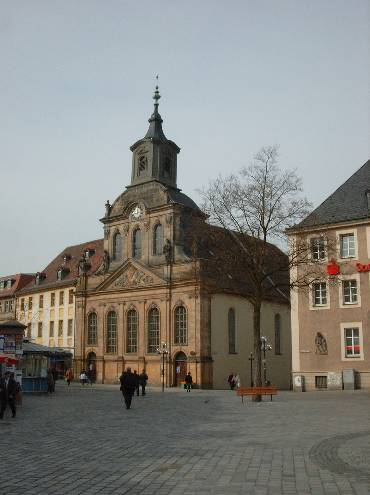 Spitalkirche Bayreuth von außen